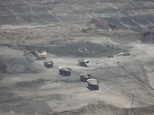 El Cerrejón Mine, Colombia